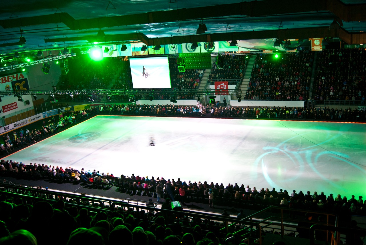 Большая Арена Ермак на 7000 человек в городе Ангарске